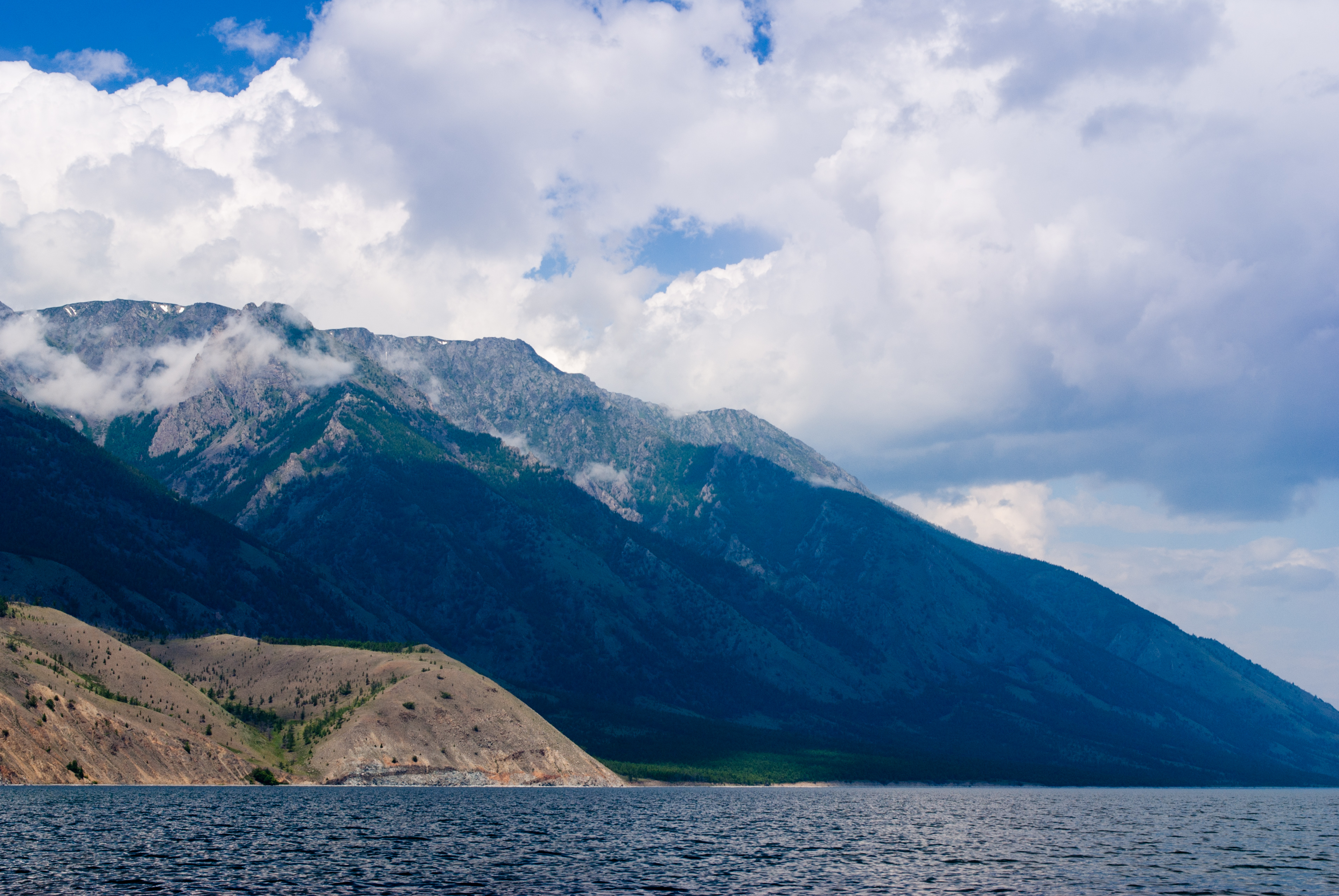 Байкало-Ленский заповедник: Качугский район, Иркутская область This image is related to the protected area of Russia number 3800183